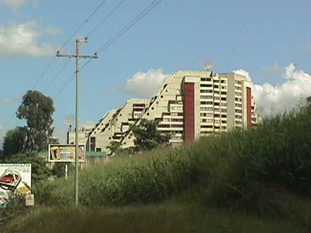 Complejo habitacional Juan Pablo (Montalban) en el municipio Libertador, Distrito Capital - Venezuela (2000)